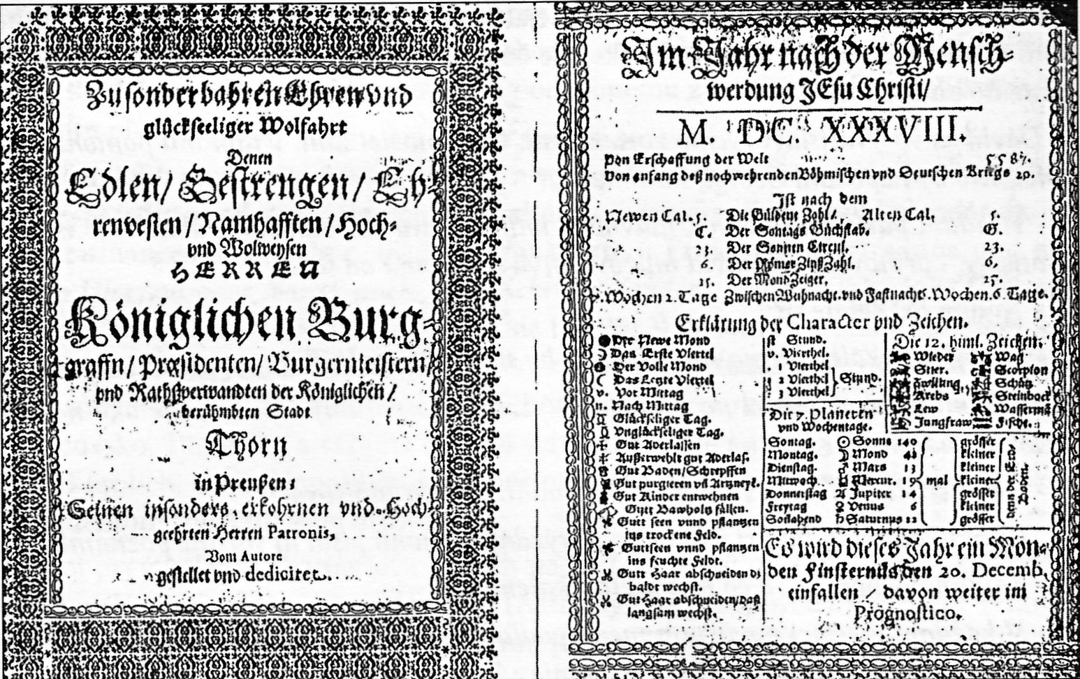 Kalendár Davida Frölicha z roku 1638. Bol geograf, historik, astronóm, fyzik, chemik, filológ, pedagóg, cestovateľ... - jeden z najväčších vedcov Európy z obdobie sedemnásteho storočia. Narodil sa v Ľubici, okres Kežmarok. Žil v Kežmarku - Slovakia.